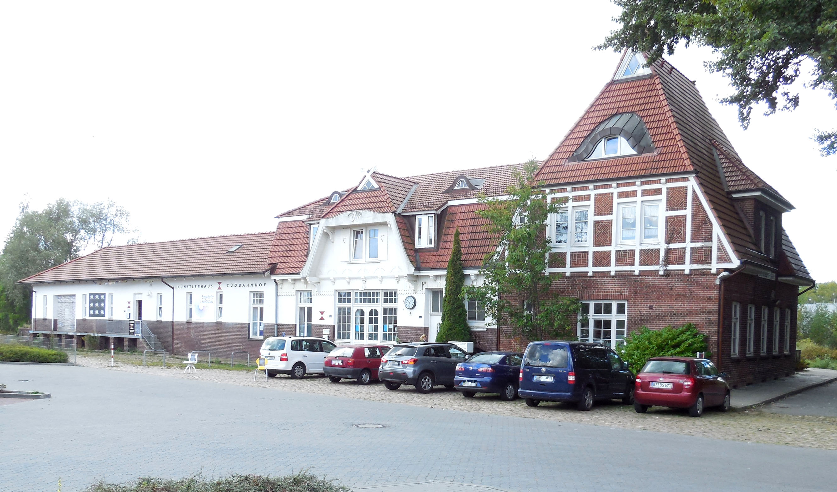 Ehemaliger Bahnhof Bergedorf Sued - Rückseite